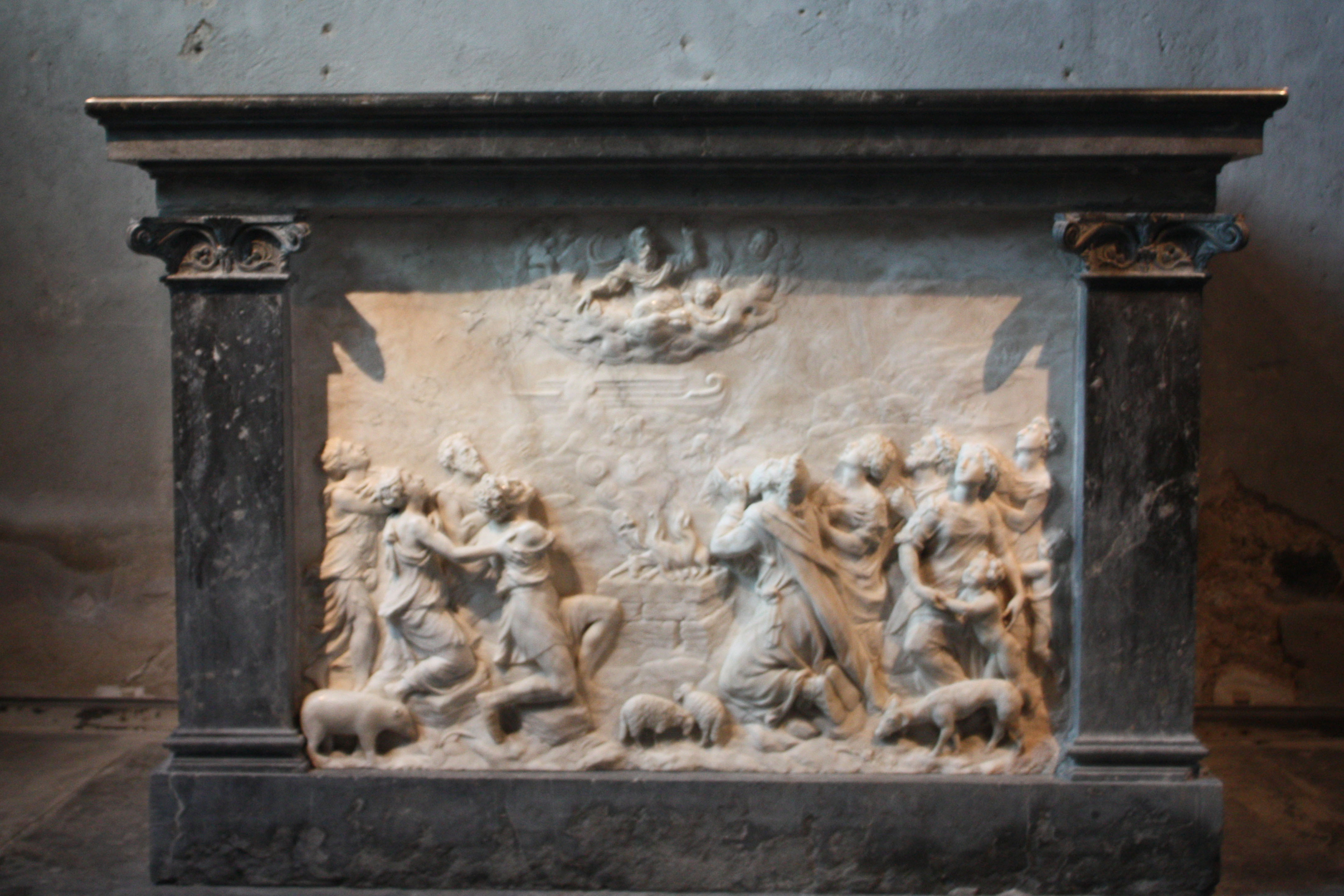 L'autel de la chapelle.